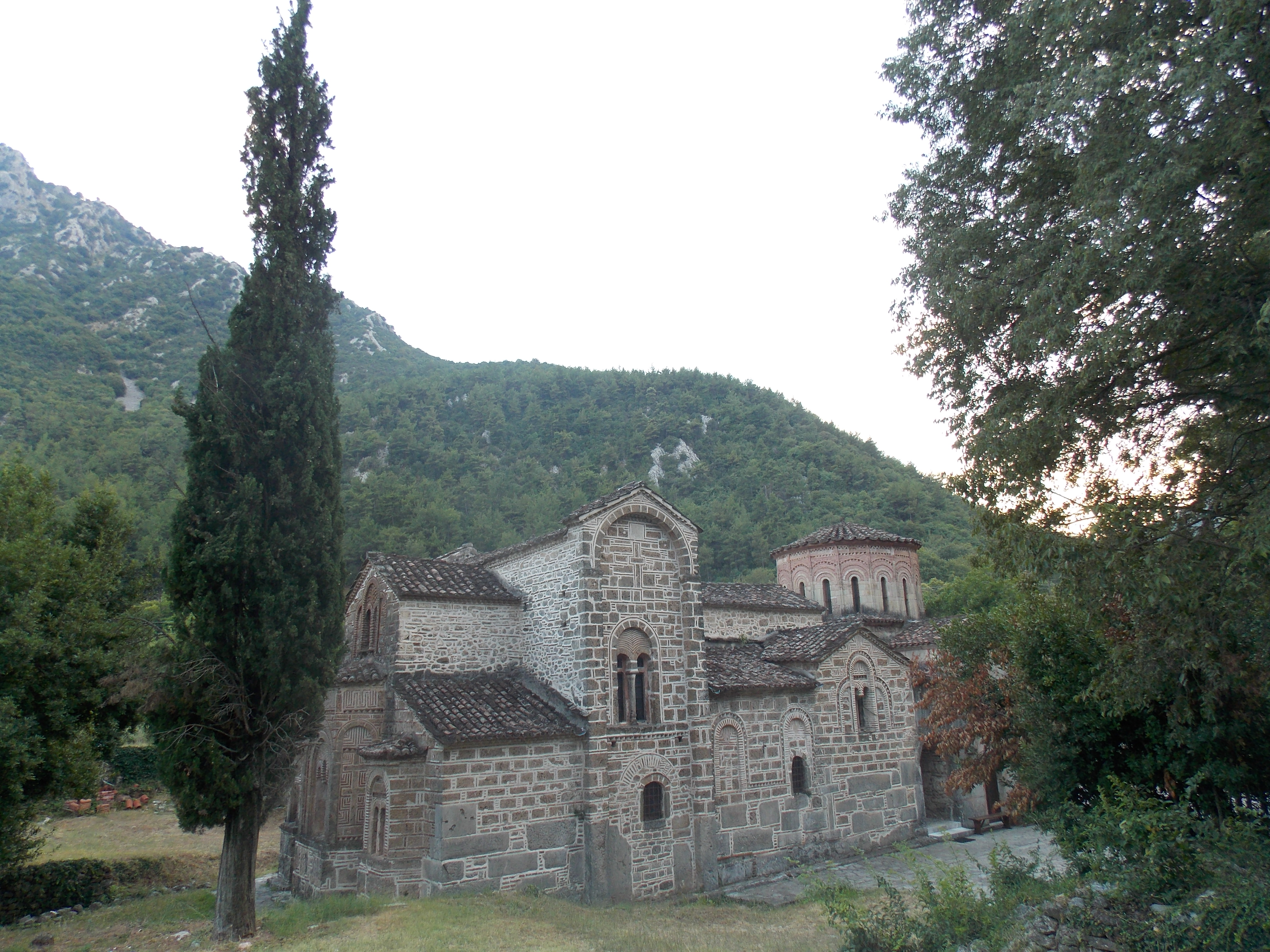 Ναός Πόρτας Παναγιάς Πύλης«Ναός Πόρτας Παναγιάς Πύλης»